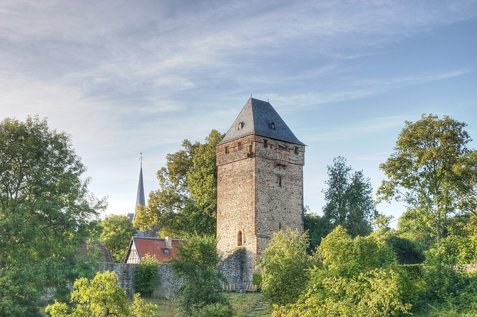 Obertor in Ortenberg im Wetteraukreis in Deutschland